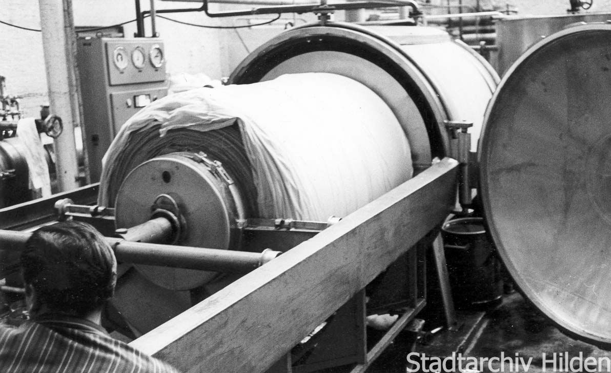 Detailaufnahme der Produktion bei Schlieper & Laag, Hofstraße, Hilden